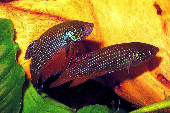 Betta smaragdina pair